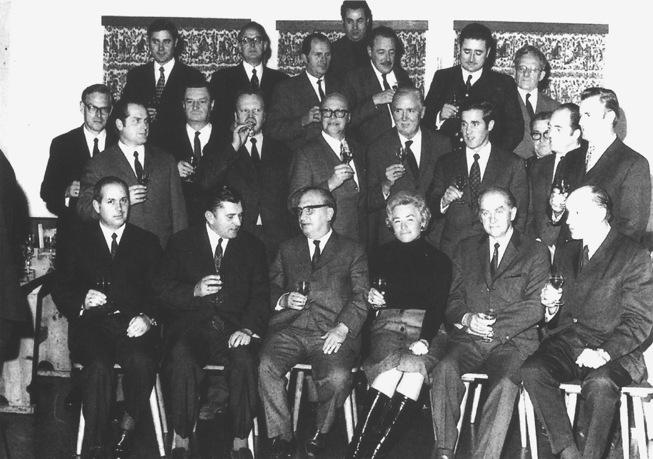 Weinbruderschaft Krems - Teilnehmer der Gründungsversammlung der